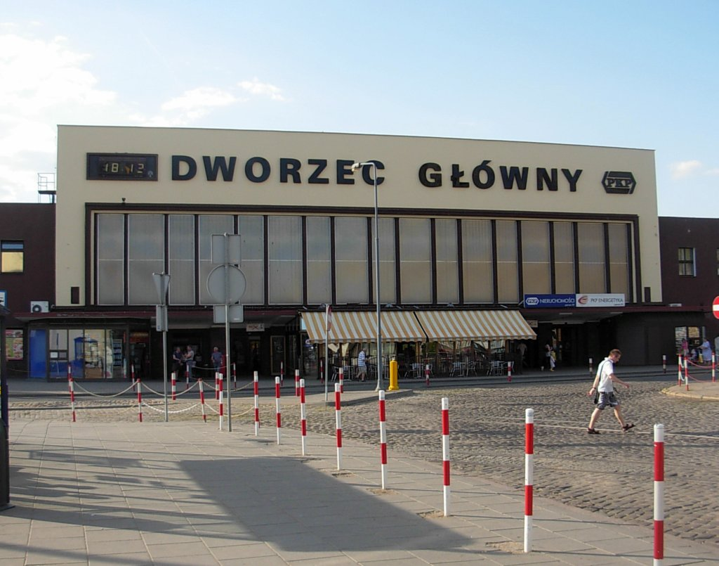 Budynek dworca kolejowego Bydgoszcz Główna, terminal z okresu 1968-2015